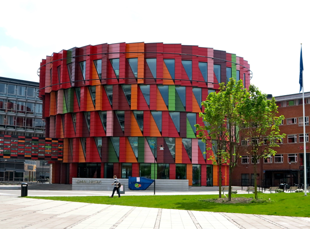 Kuggen Lindholmen Göteborg september 2013